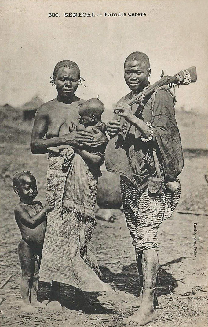 François-Edmond Fortier, Sénégal. Famille cérère. Afrique Occidentale - Sénégal.